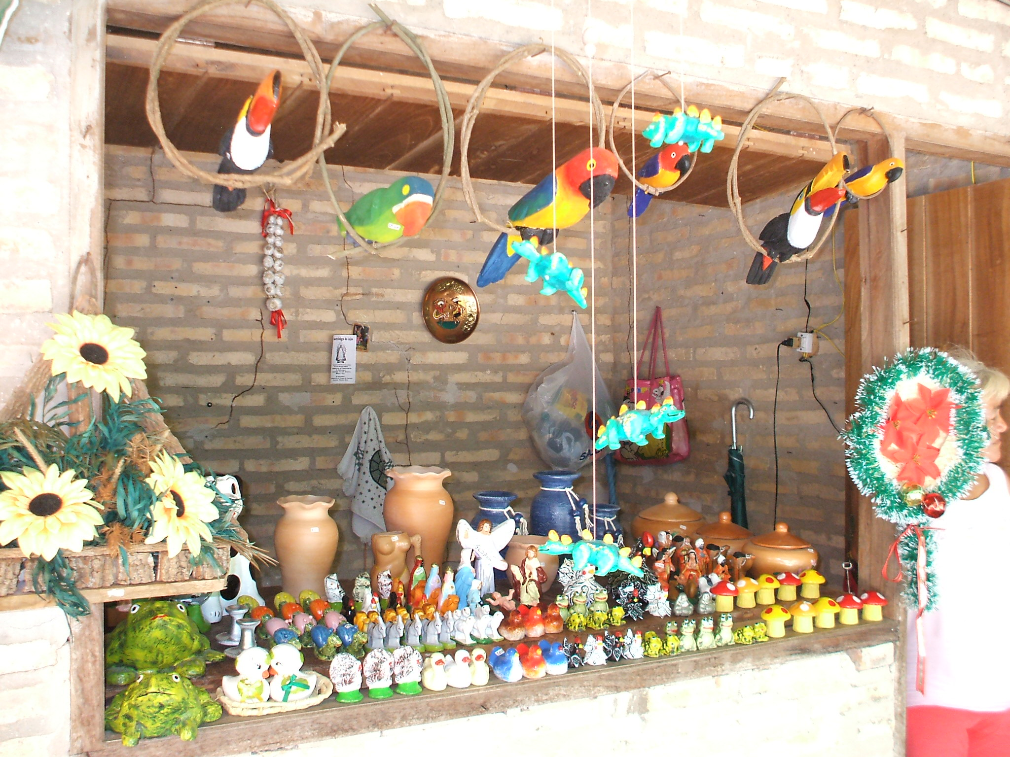 Artesania en madera